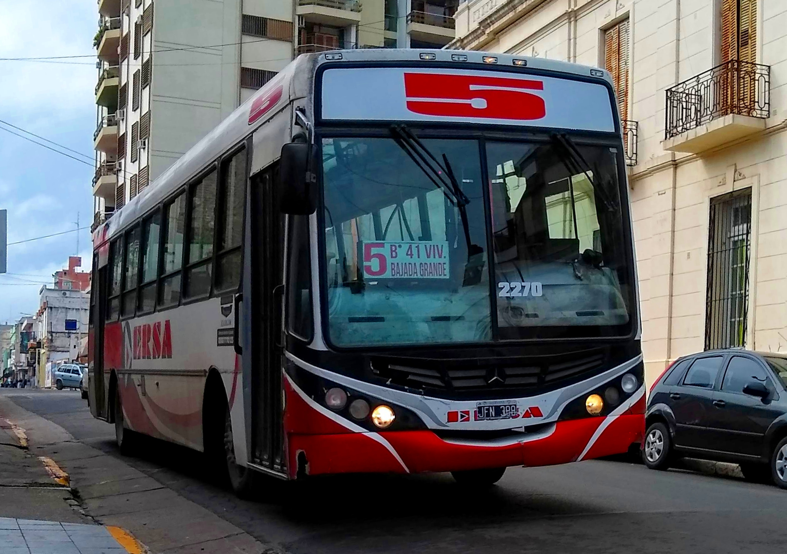 ERSA Urbano Paraná Línea 5 - Interno 2270 Metalpar Tronador II Mercedes-Benz OF1722 Calle Bavio entre Pellegrini e Italia (Paraná, Entre Ríos)